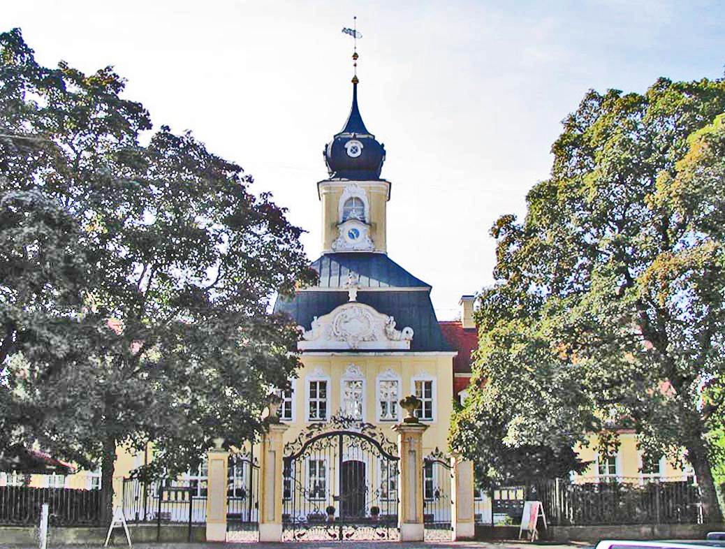 Haupteingang des Gohliser Schlösschens in der Menckestraße.